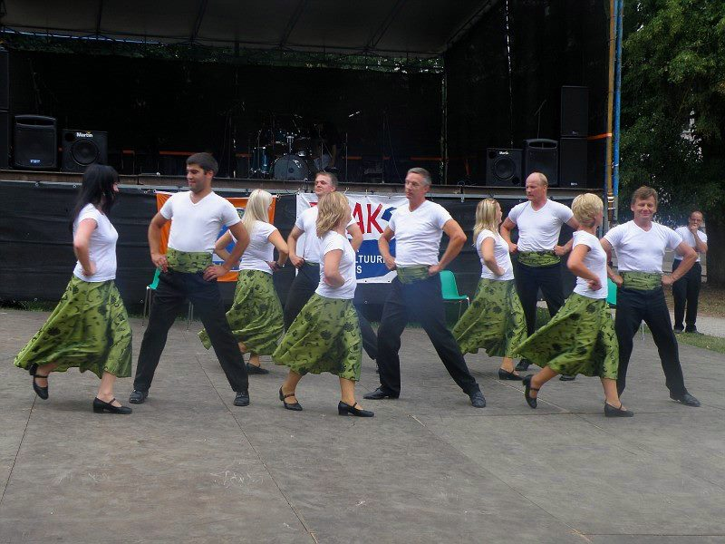 Tantsurühm Nii ja naa